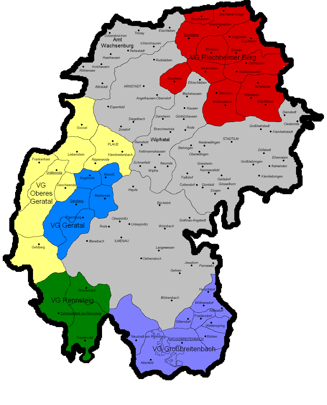 Gemeindekarte Ilm-Kreis mit Verwaltungsgemeinschaften und Ortsteilen.